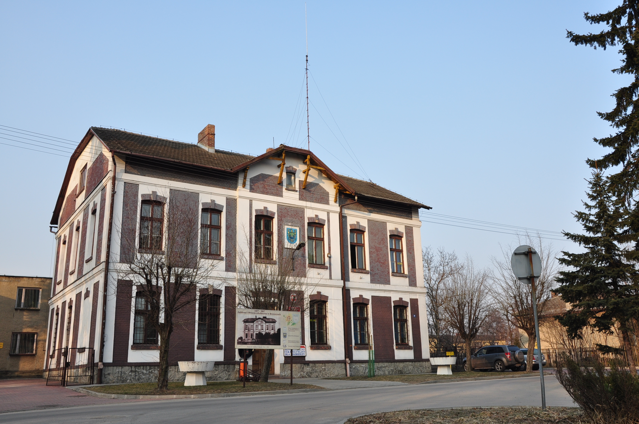 Urząd Miejski w Brzeszczach.